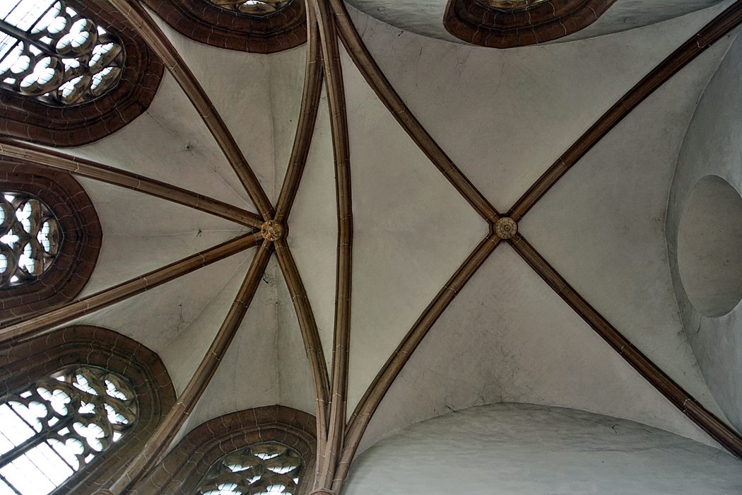 Magdeburg, Inneres der Magdalenenkapelle